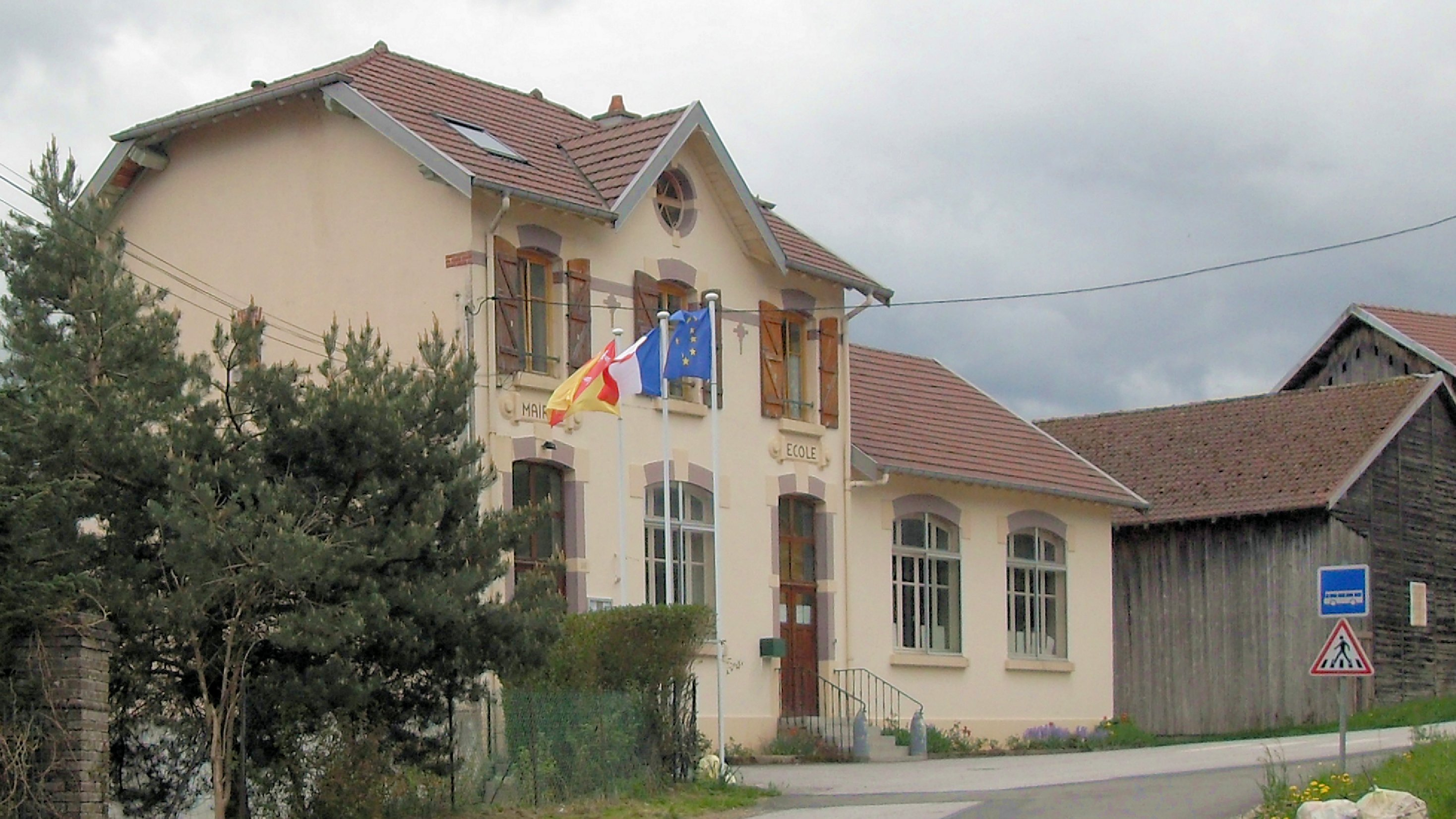 La mairie-école d'Herpelmont